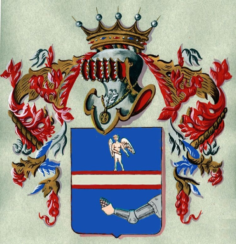 Blasonatura: d'azzurro, colla fascia in divisa cucita di rosso, accompagnata nel capo da un angelo principato alato al naturale, e nella punta da un destrocherio armato, impugnante una pina di verde.